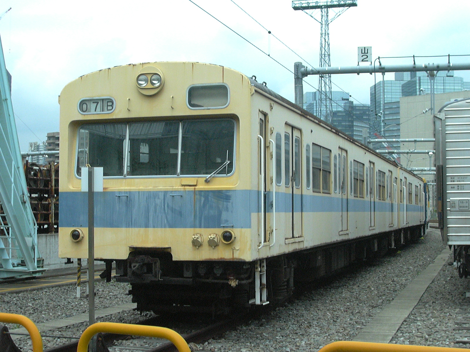 東京総合車両センター西エリアの入換車「たんぽぽ」（元クモハ101-170） （2006年夏の一般公開時に撮影）